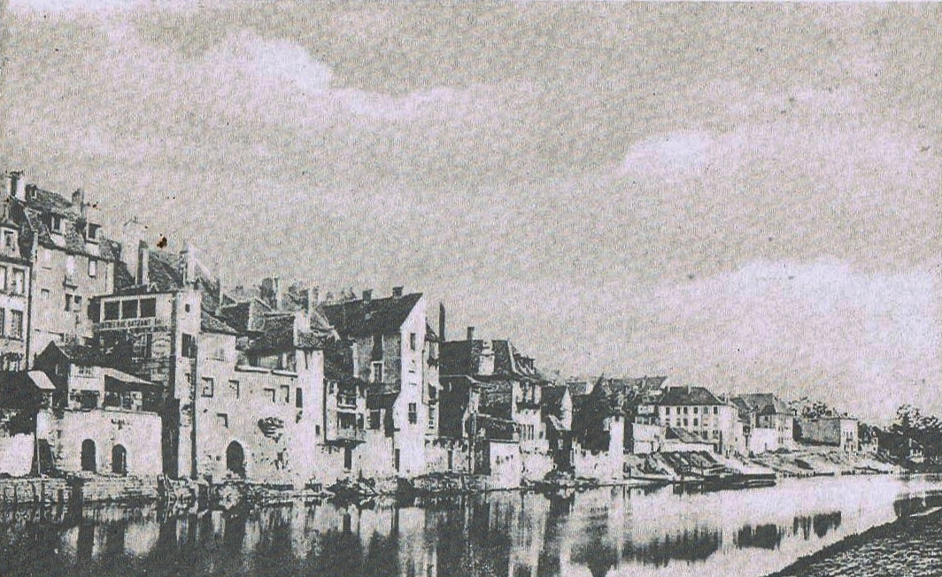 Le quai de Battant à Besançon (aujourd'hui quai de Strasbourg), entre 1860 et 1865.